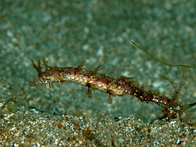 タツノイトコ Acentronura gracilissima